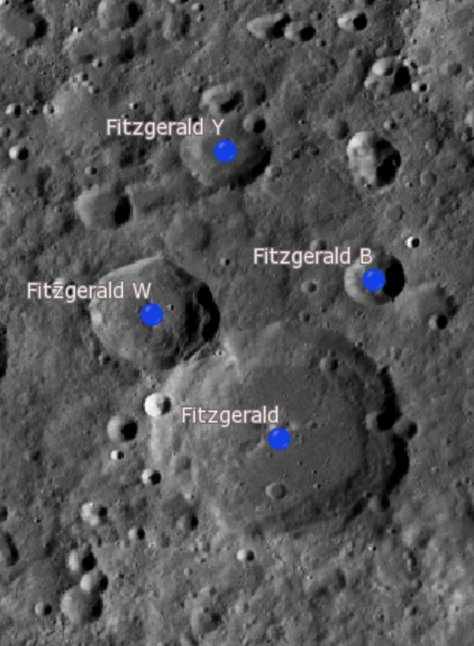 Cráter lunar FitzGerald. Cráteres satélite. (Imagen LROC)